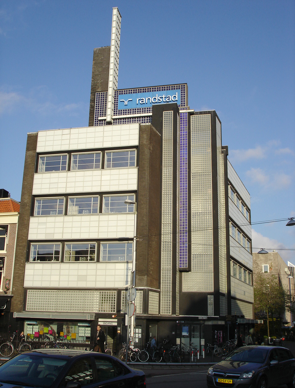 Zelfgemaakte media